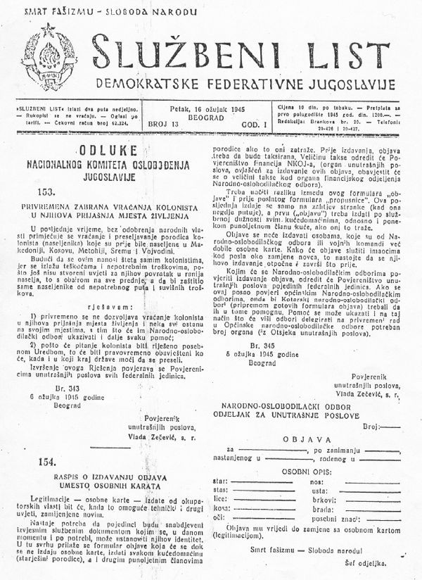 Srpskohrvatski / српскохрватски: Odluka o privremenoj zabrani povratka kolonista na njihova prijašnja mesta življenja.